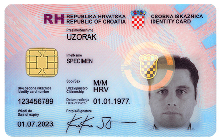 Uzorak osobne iskaznice od 8. lipnja 2015.